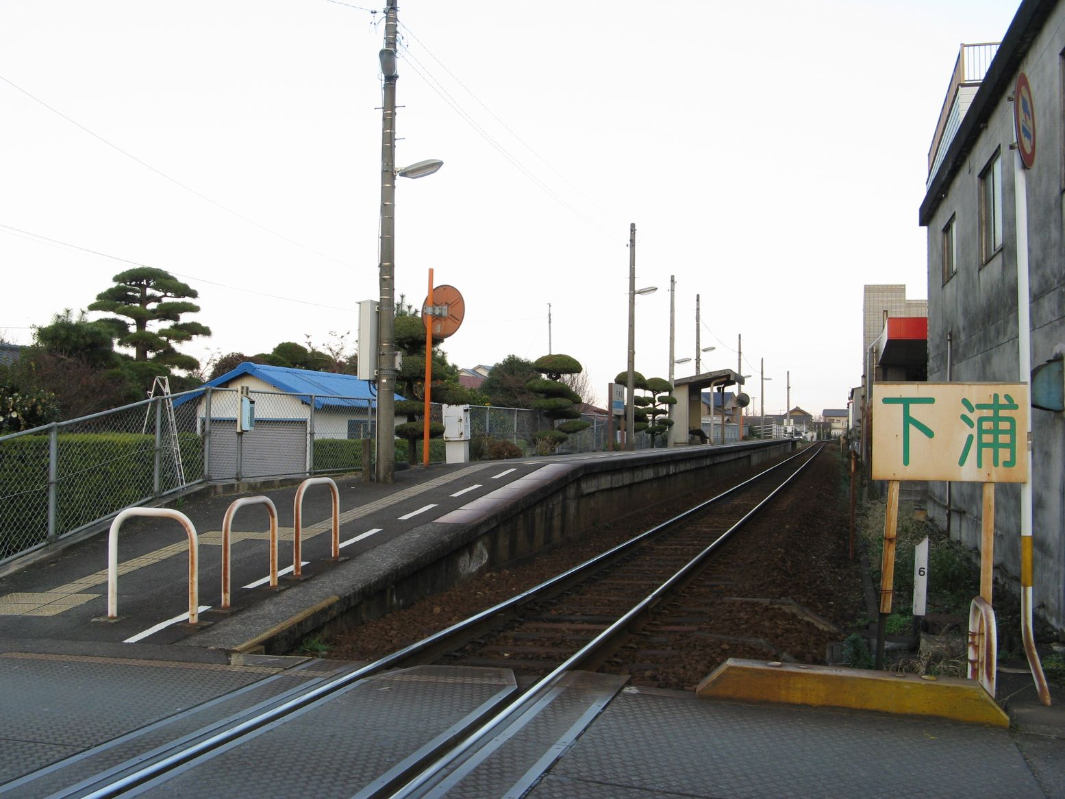 徳島線下浦駅 2008年12月19日 Bakkai撮影